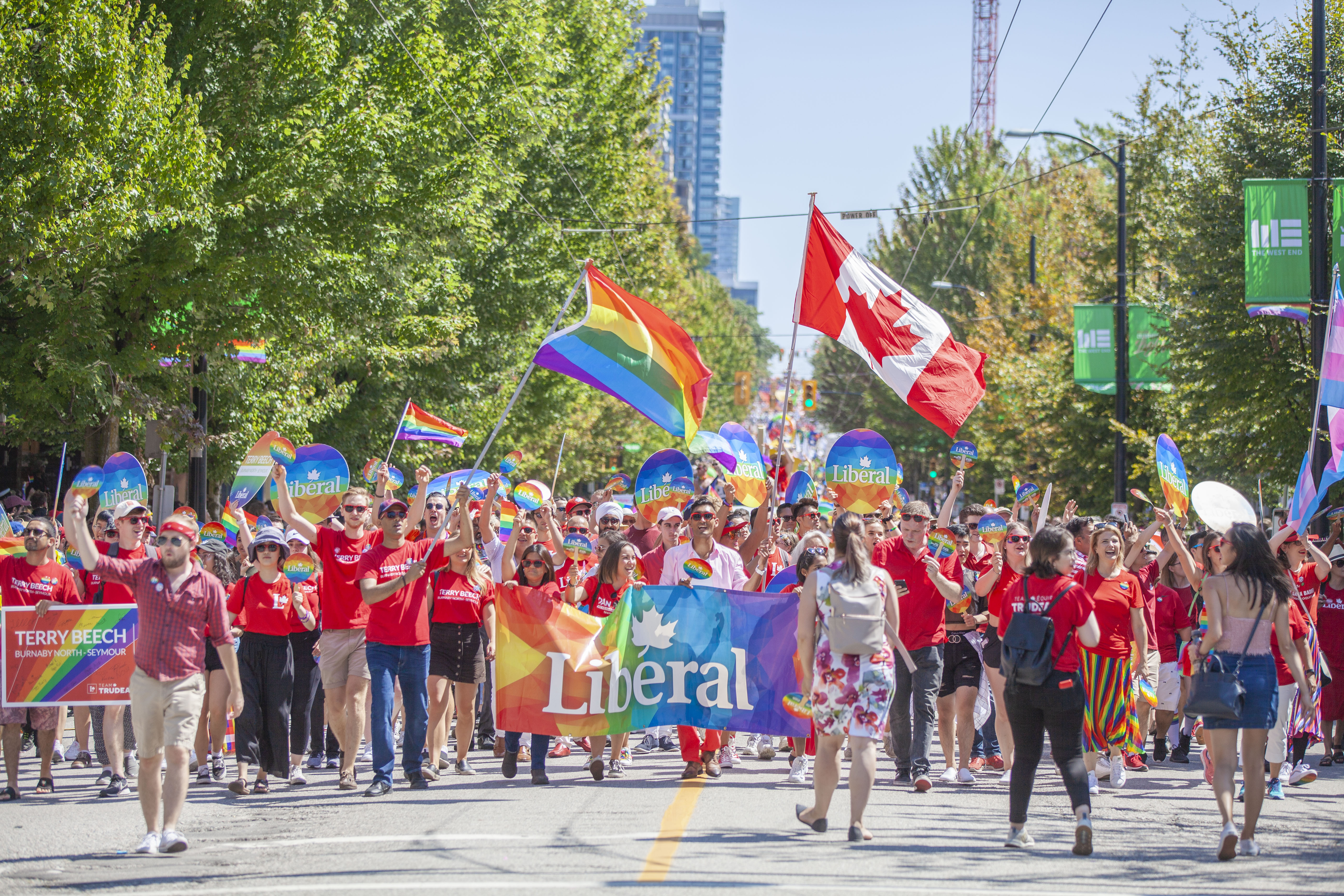 Pride Parade 2019